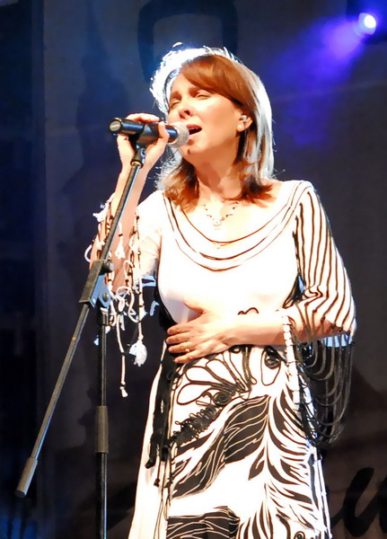 Изворну фотографију сам направио ја, на концерту Биље Крстић у Крагујевцу у градској дворани "Шумадија" 25. маја 2008. године. Ово је мало прерађена верзије дотичне слике тј. исечен део.